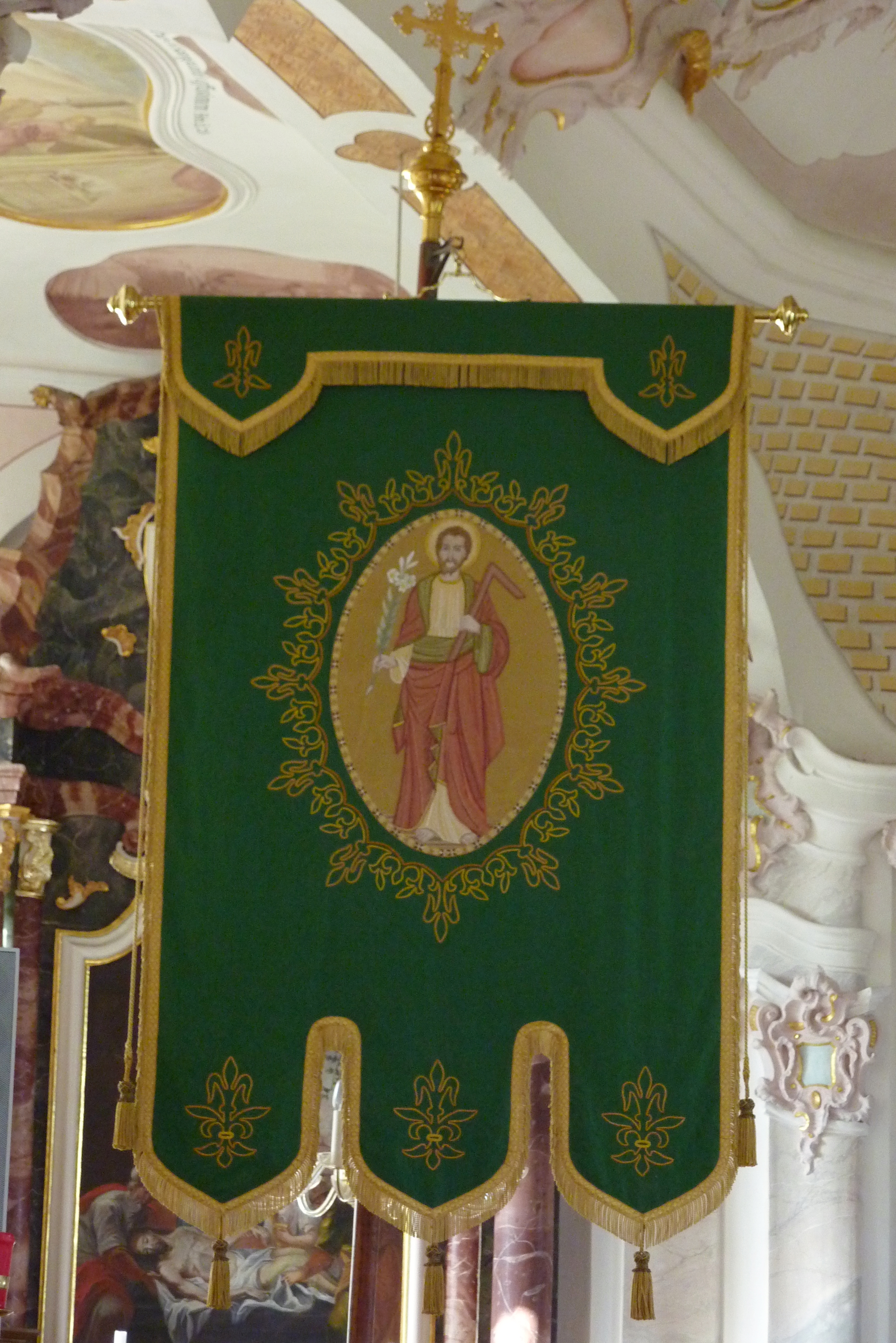 Katholische Wallfahrtskirche Heilig Kreuz in Mindelaltheim, einem Ortsteil von Dürrlauingen im Landkreis Günzburg (Bayern), 1698 von Jakob Albrecht erbaut, 1753 von Joseph Dossenberger d.J. erweitert, Prozessionsfahne, Darstellung: hl. Joseph